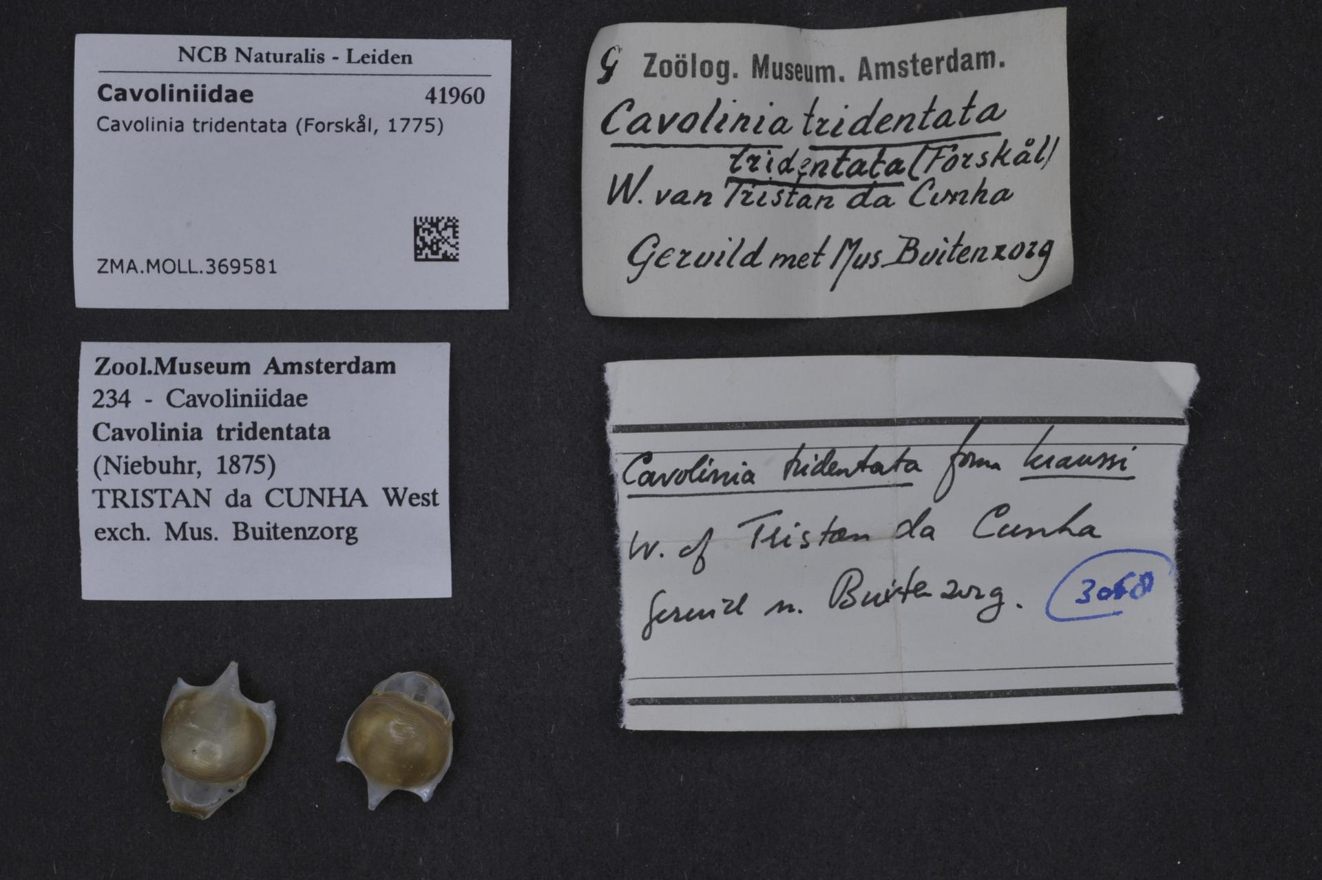 Cavolinia tridentata (Forsskål, 1775)